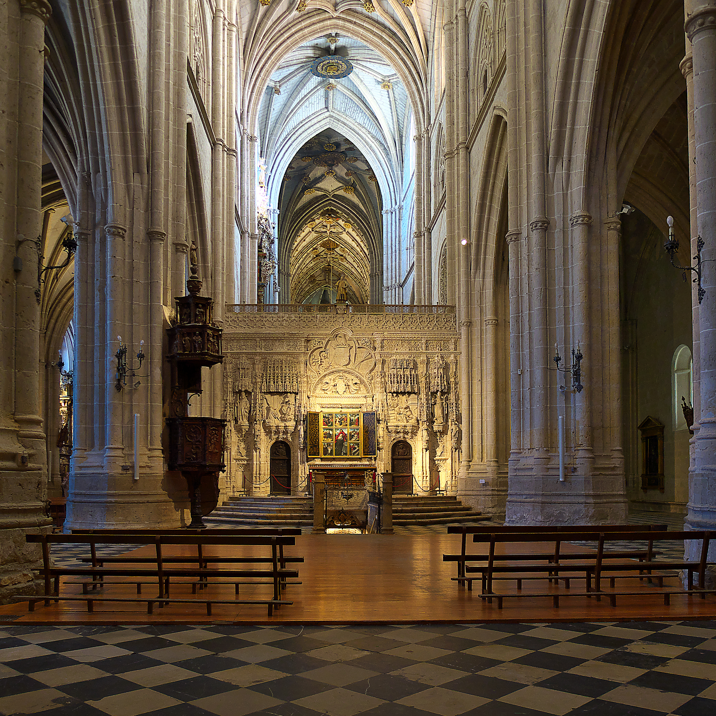 Trascoro (s. XVI) y nave central de la catedral.